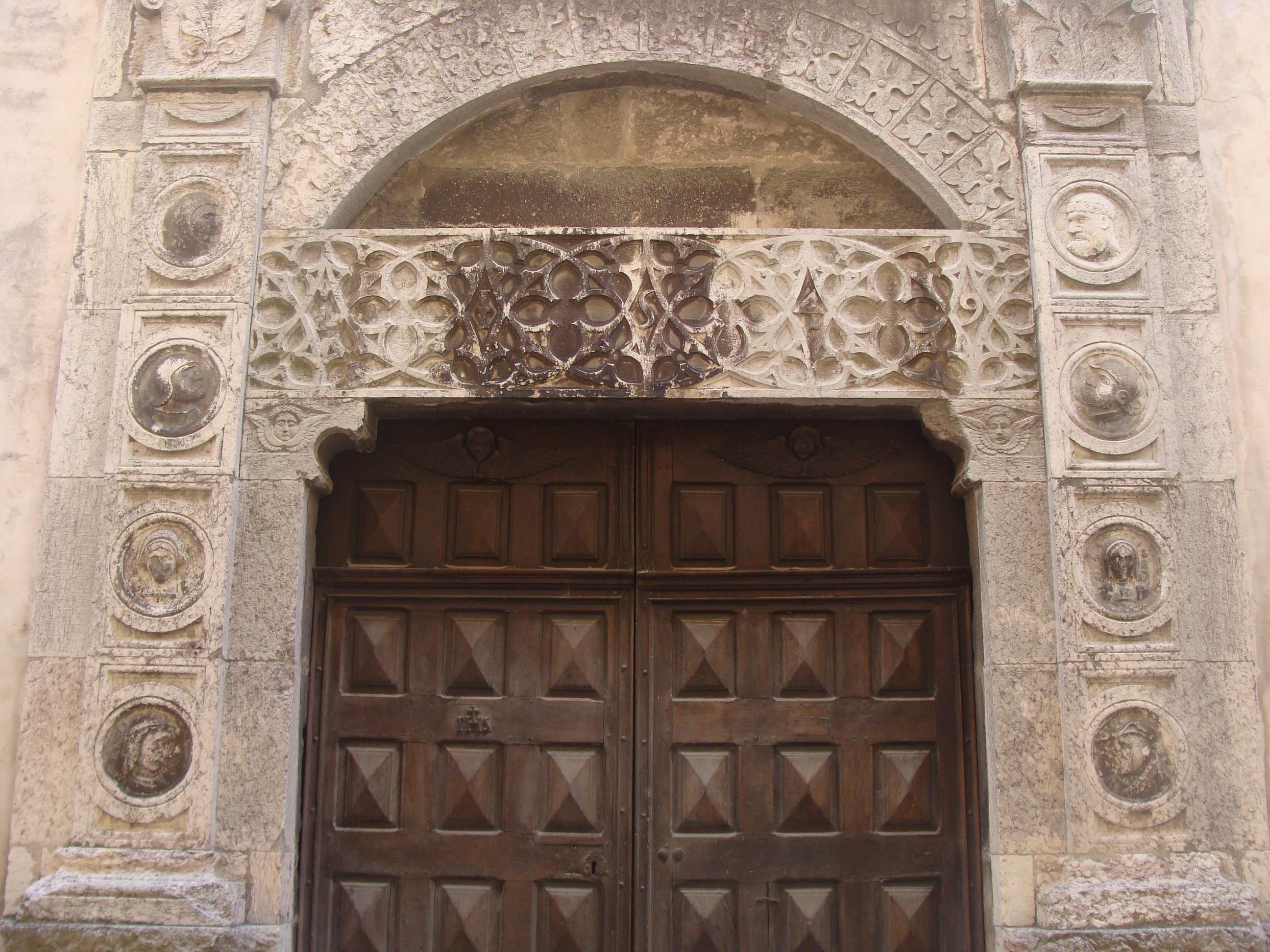 Le portail principal de l'église de Tallard et ses sculptures, frises et médaillons.